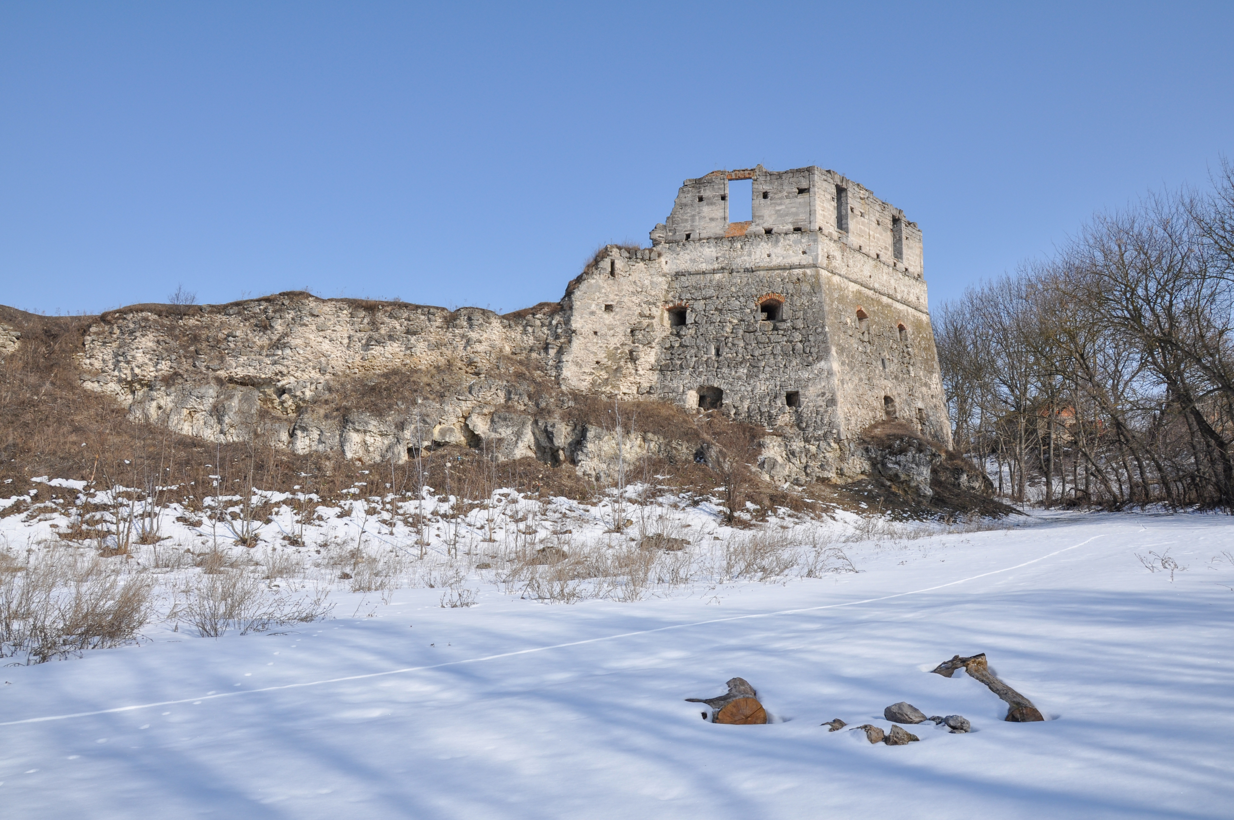 Замок (мур.), Токи